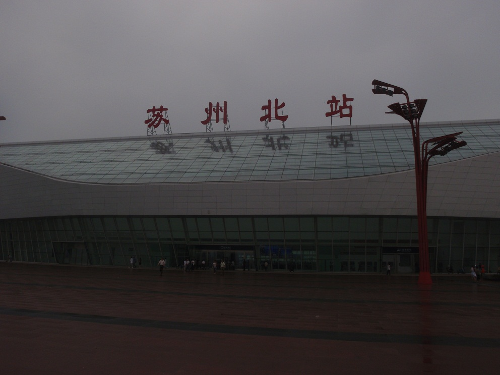 蘇州北駅、中華人民共和国。京滬高速鉄道の中間駅の一つ。